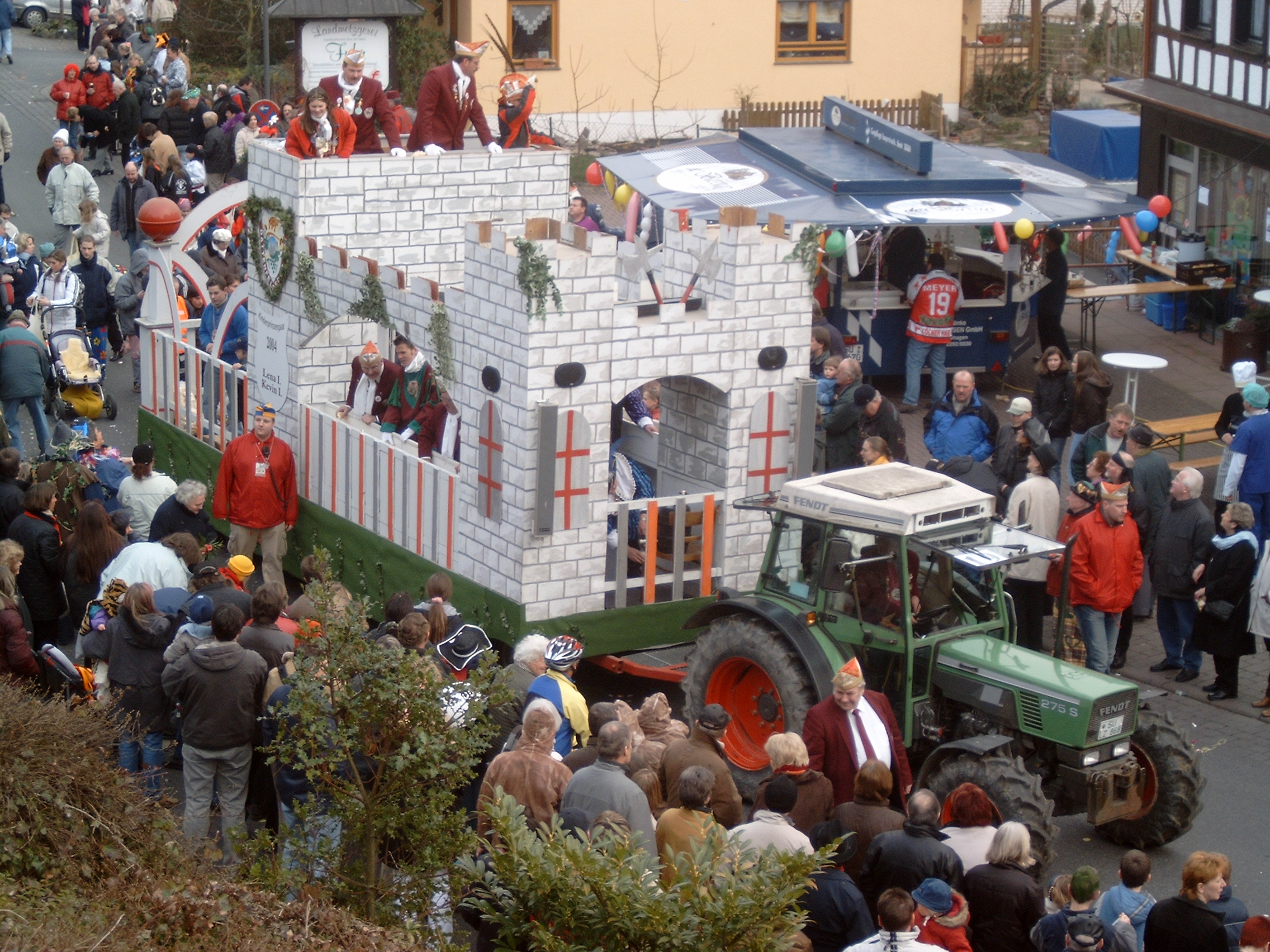 Dörflicher Karnevalsumzug in Windeck-Herchen